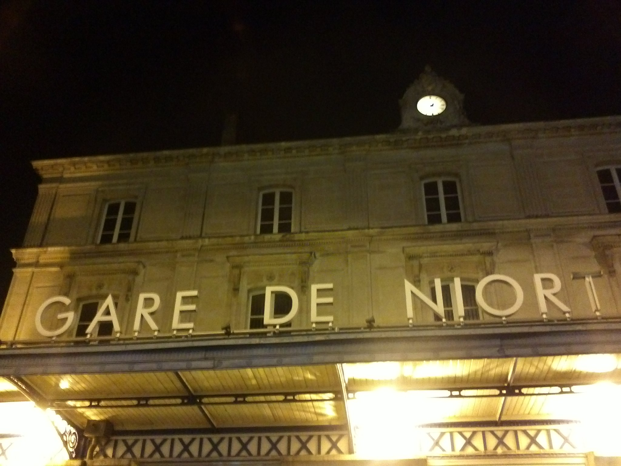 la nuit de la gare de Niort